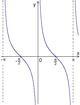 Graf funkce kontangens.